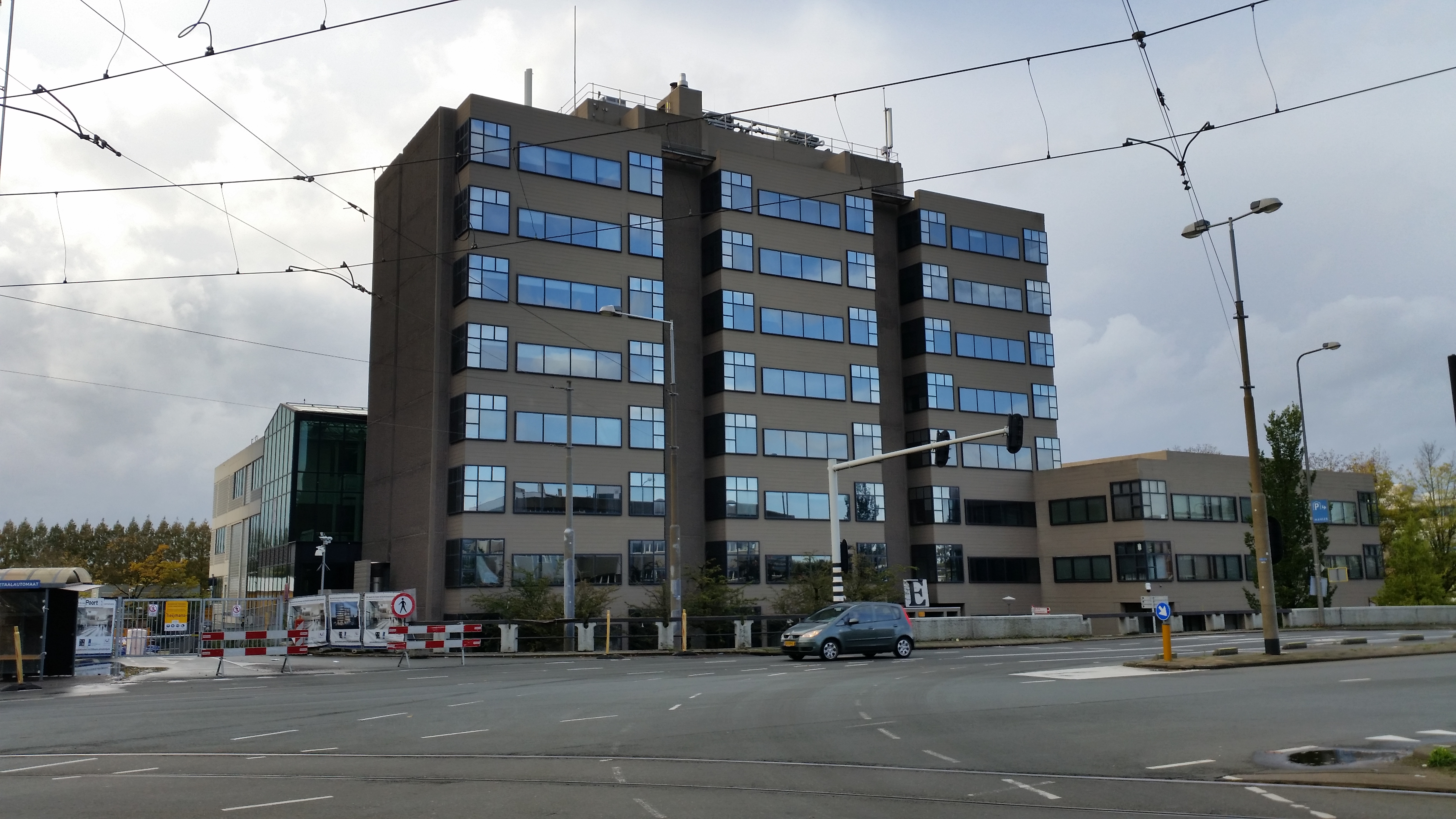 Parnassusweg 200 met de Rechtbank Amsterdam (monumentgedeelte)